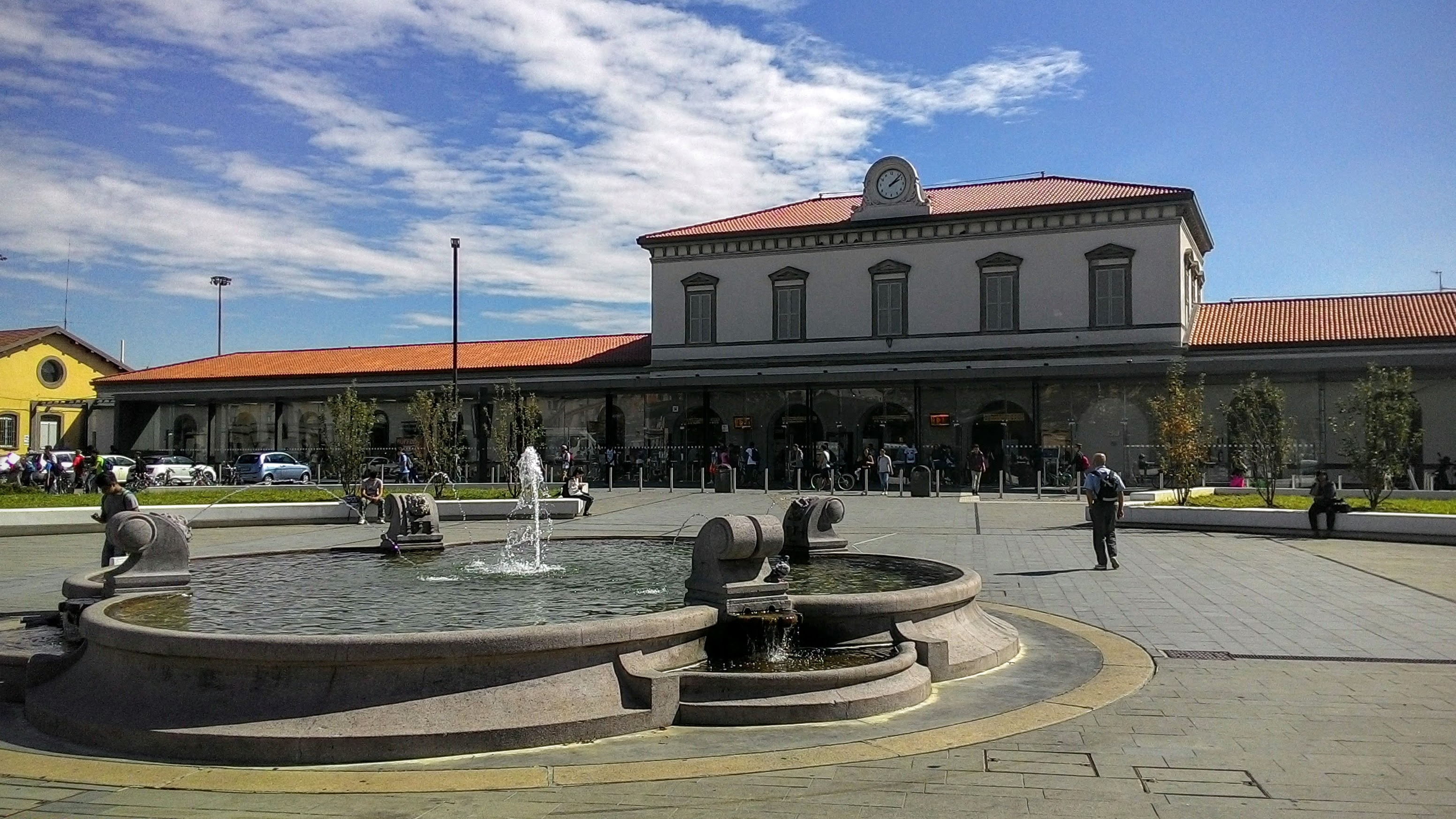 La facciata della stazione di Bergamo nel 2016